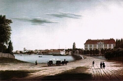 Ölgemälde eines unbekannten Künstlers aus dem 19. Jahrhundert, das die Lange Brücke („Seufzerbrücke“/Dahme-Überwegung) und das Barockschloss Köpenick um 1830 zeigt.